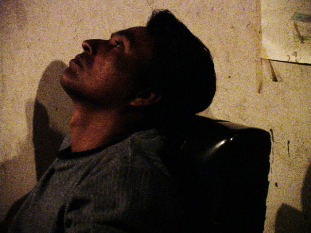 Boredom